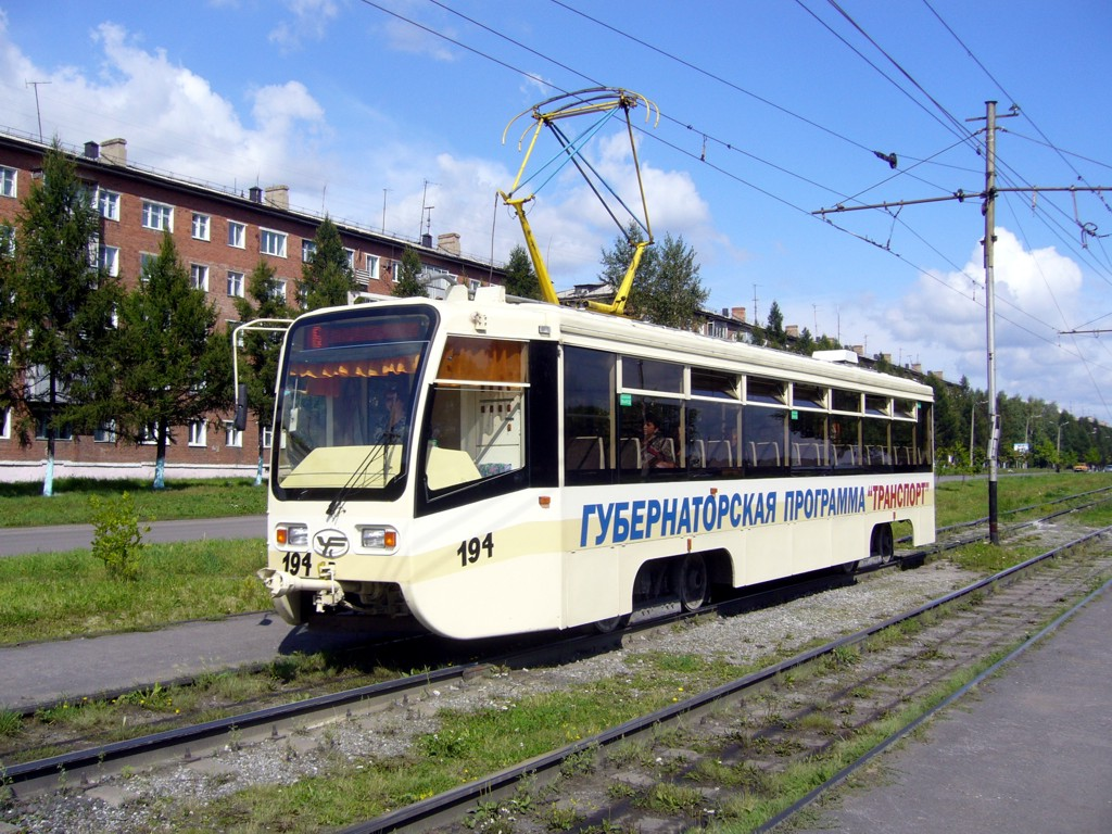 Трамвайный вагон 71-619 на ул. Гайдара в Прокопьевске.